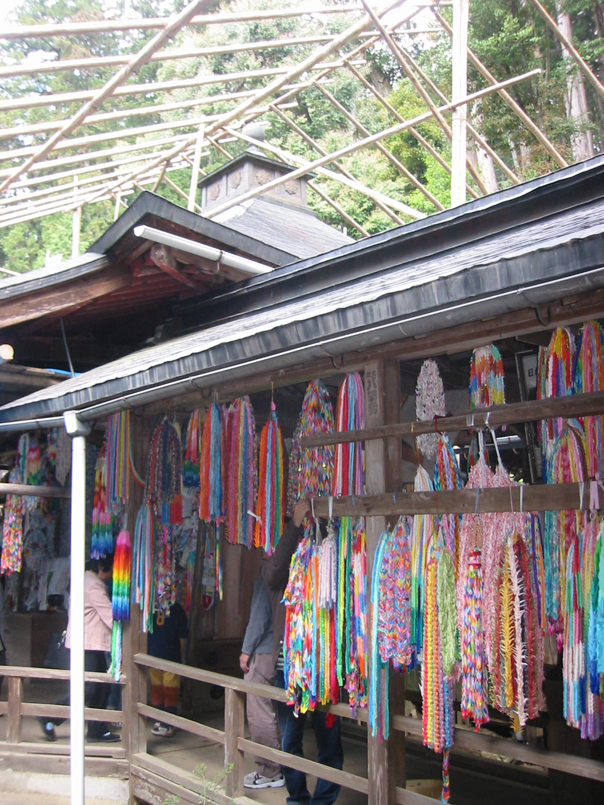 谷汲山華厳寺